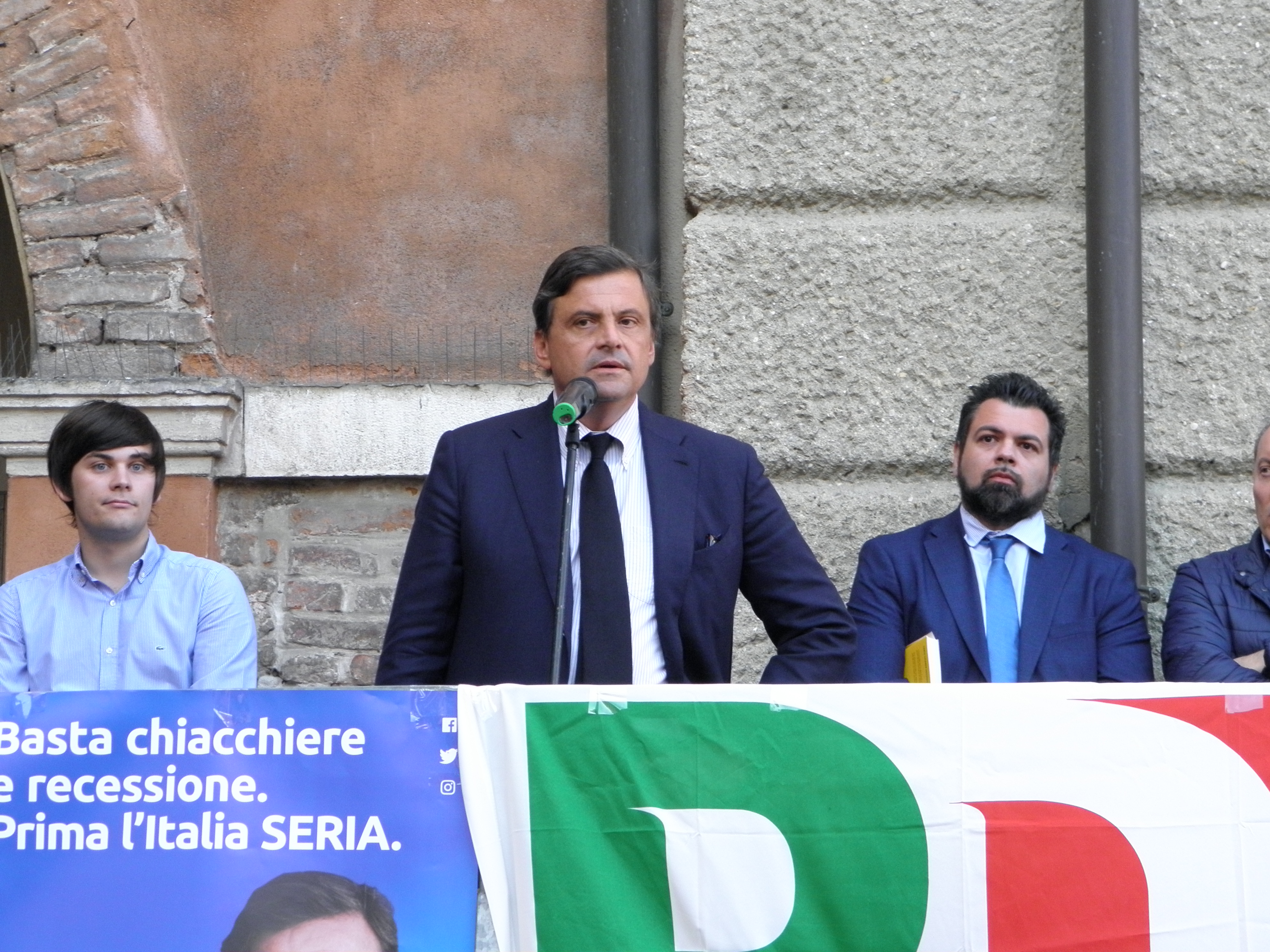 Rovigo, Piazza Vittorio Emanuele II, 9 maggio 2019: comizio elettorale dell'ex ministro dello Sviluppo economico Carlo Calenda in occasione delle elezioni al Parlamento Europeo del 2019, a sostegno del candidato sindaco PD Edoardo Gaffeo.